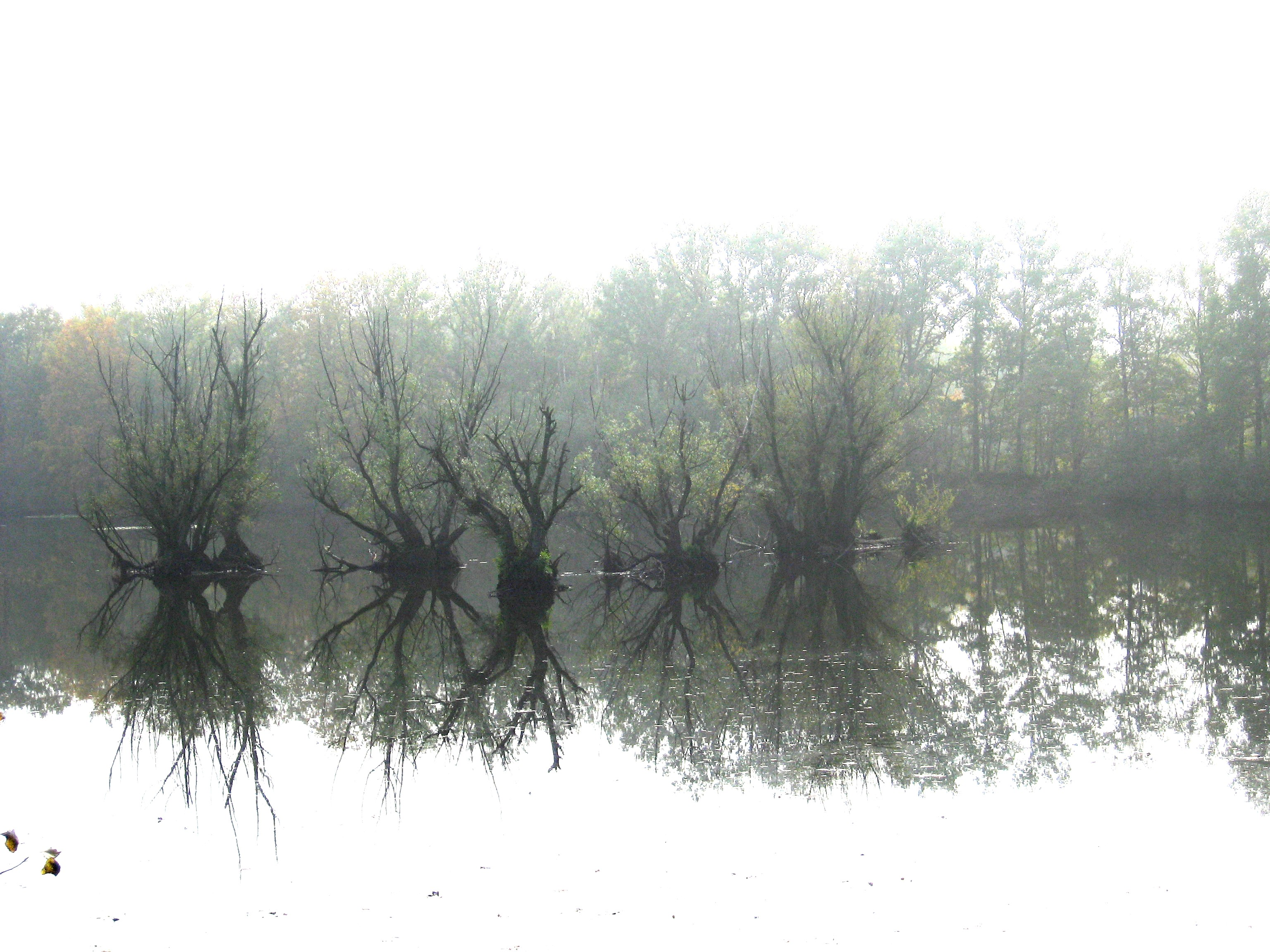 Ven met in het midden enkele wilgen.